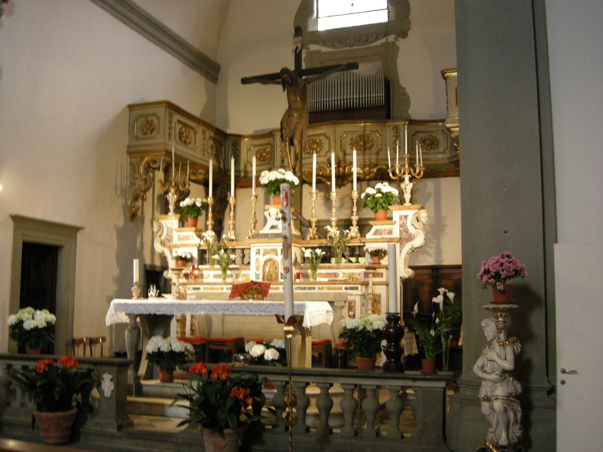 San francesco di paola (florence), interno, altare maggiore